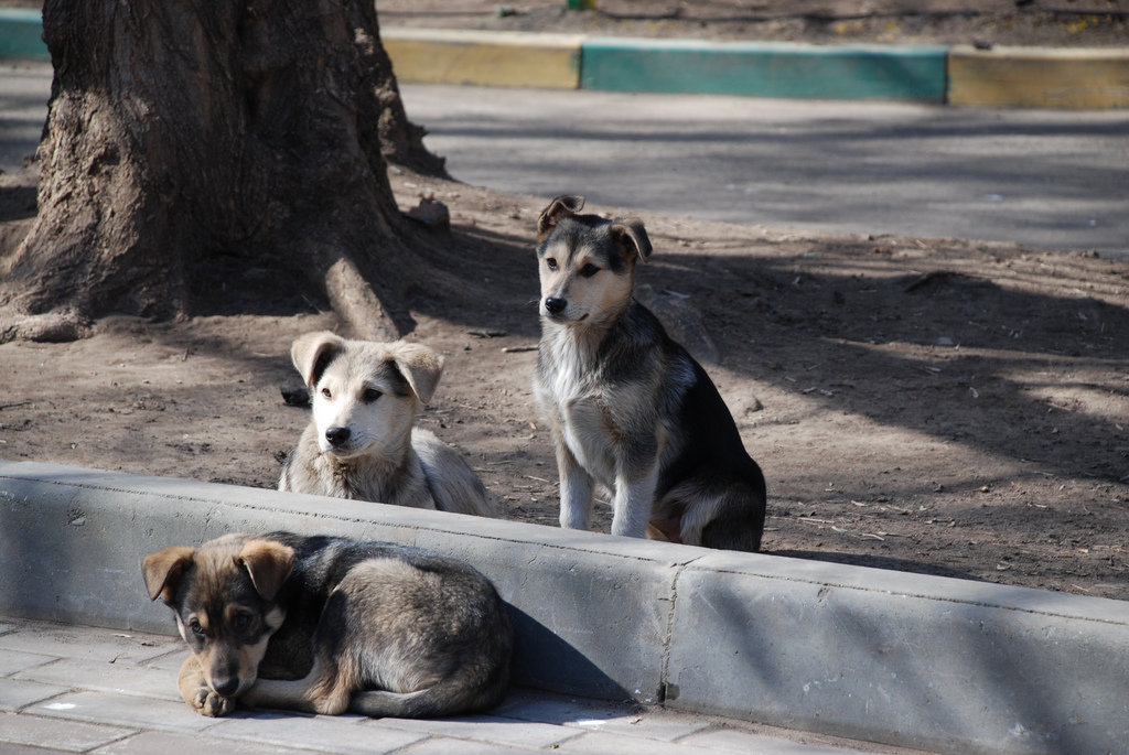 Stray dogs